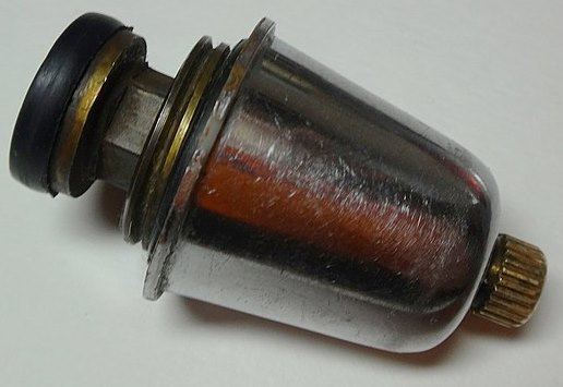 Околпачили буксу!